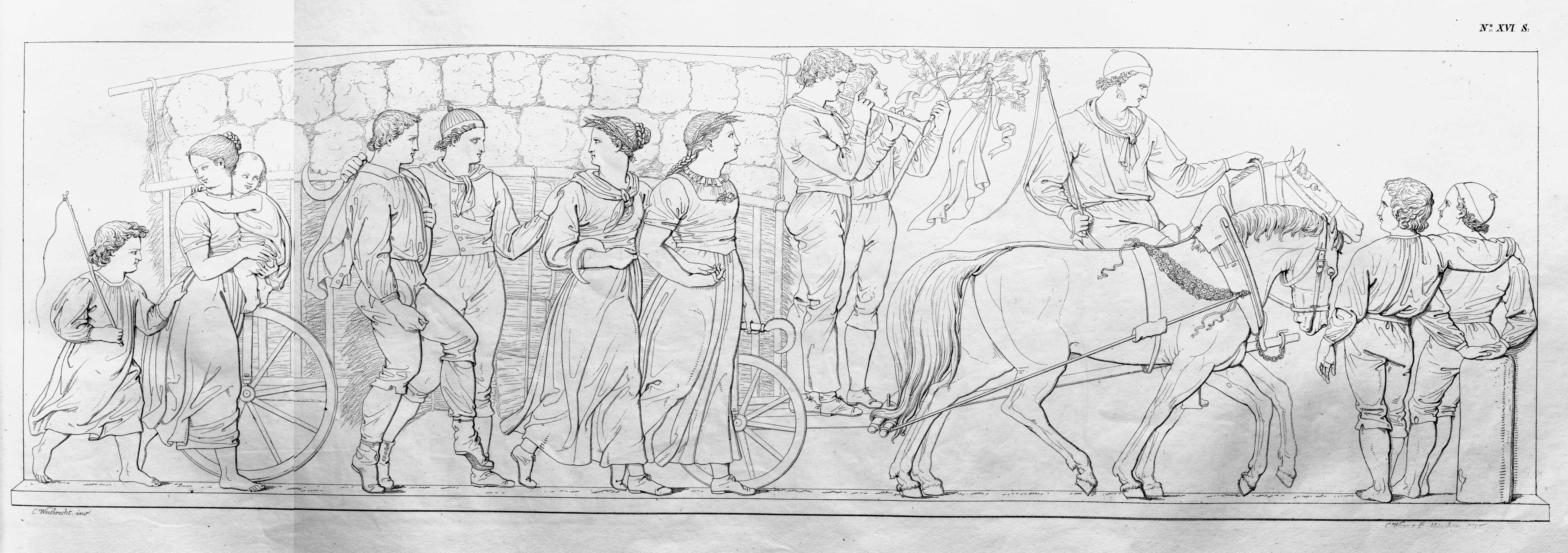 Blatt aus der Buchausgabe in Breitfolio von Conrad Weitbrechts graphischem Zyklus „Die vier Jahreszeiten“, das im Vierjahreszeitenfries von Schloss Rosenstein in Stuttgart realisiert wurde (teilweise mit Varianten).